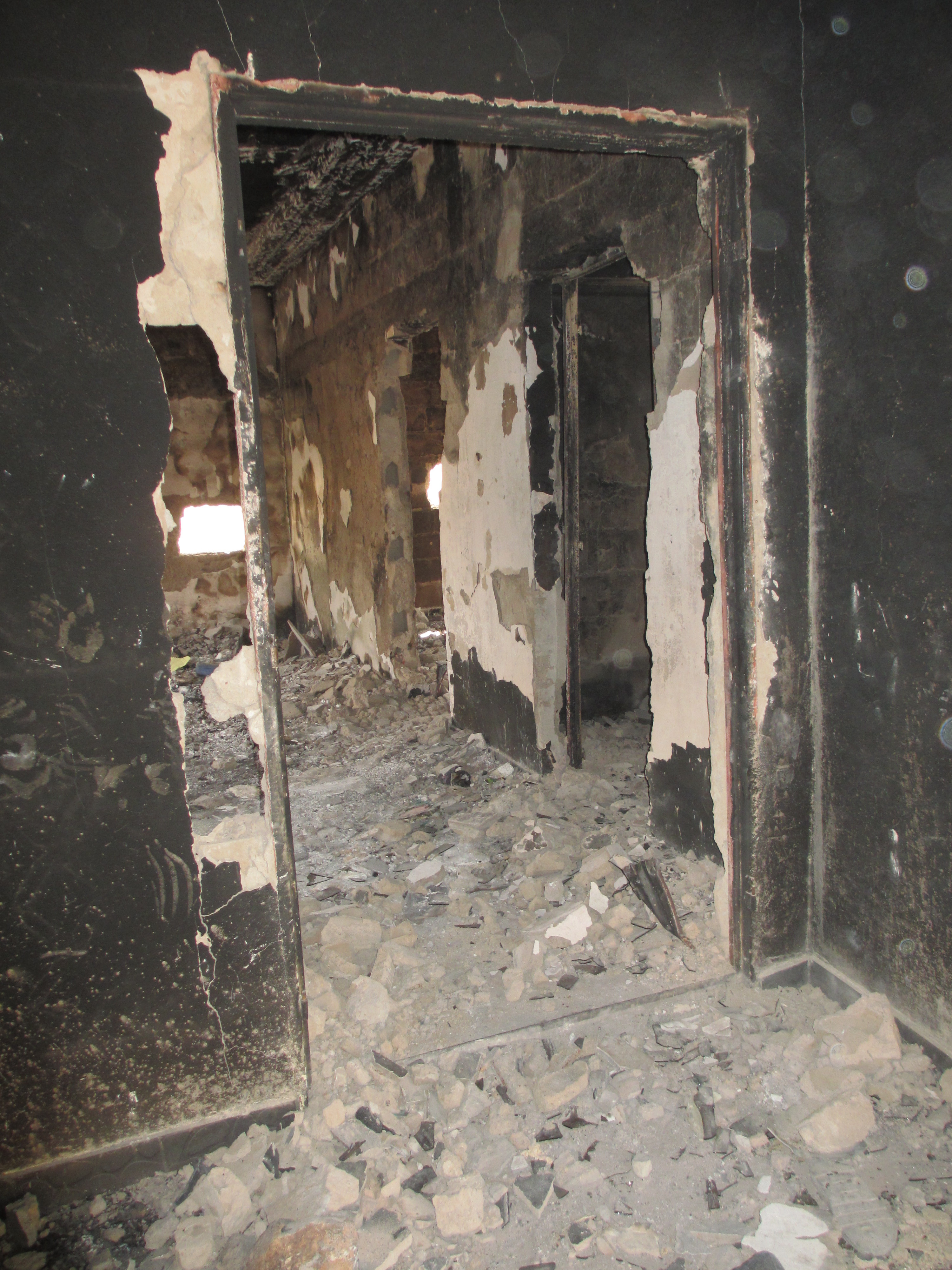 Domicile d'un autochtone chrétien de Zinder brûlé lors des émeutes religieuses dites "Charlie Hebdo" le 15 janvier 2015.